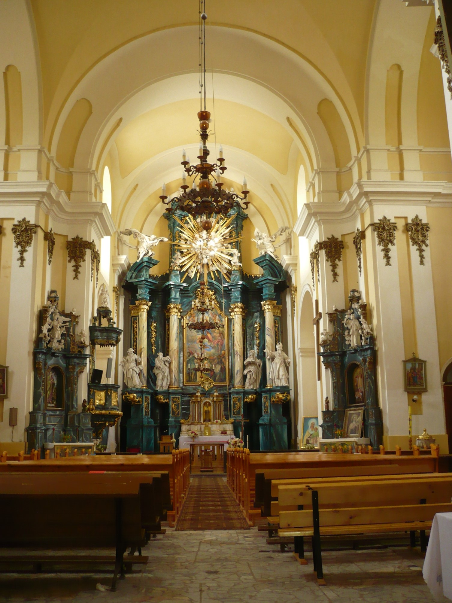 Buczacz.Kościół Wniebowziecia NMP